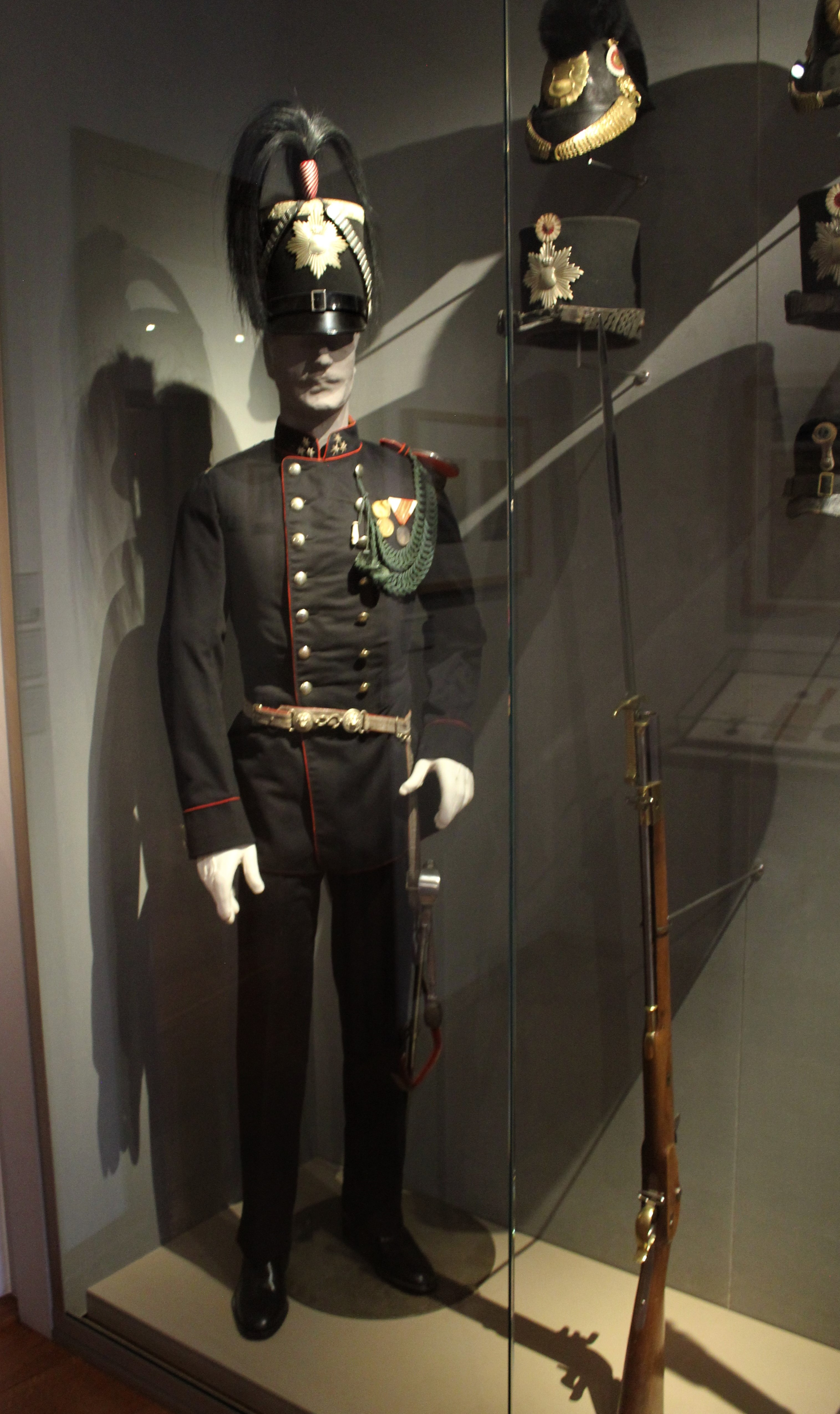 Die vollständig erhaltene liechtensteinische Militäruniform stammt von Peter Rheinberger (1831-1893), dem Kommandanten des Kontingents von 1859 bis zu dessen Abschaffung 1868. Zur Uniform gehörte ein Säbel, ein Signalpfeifchen aus Elfenbein und der Tschako (Helm) mit schwarzem Rosshaarbüschel.